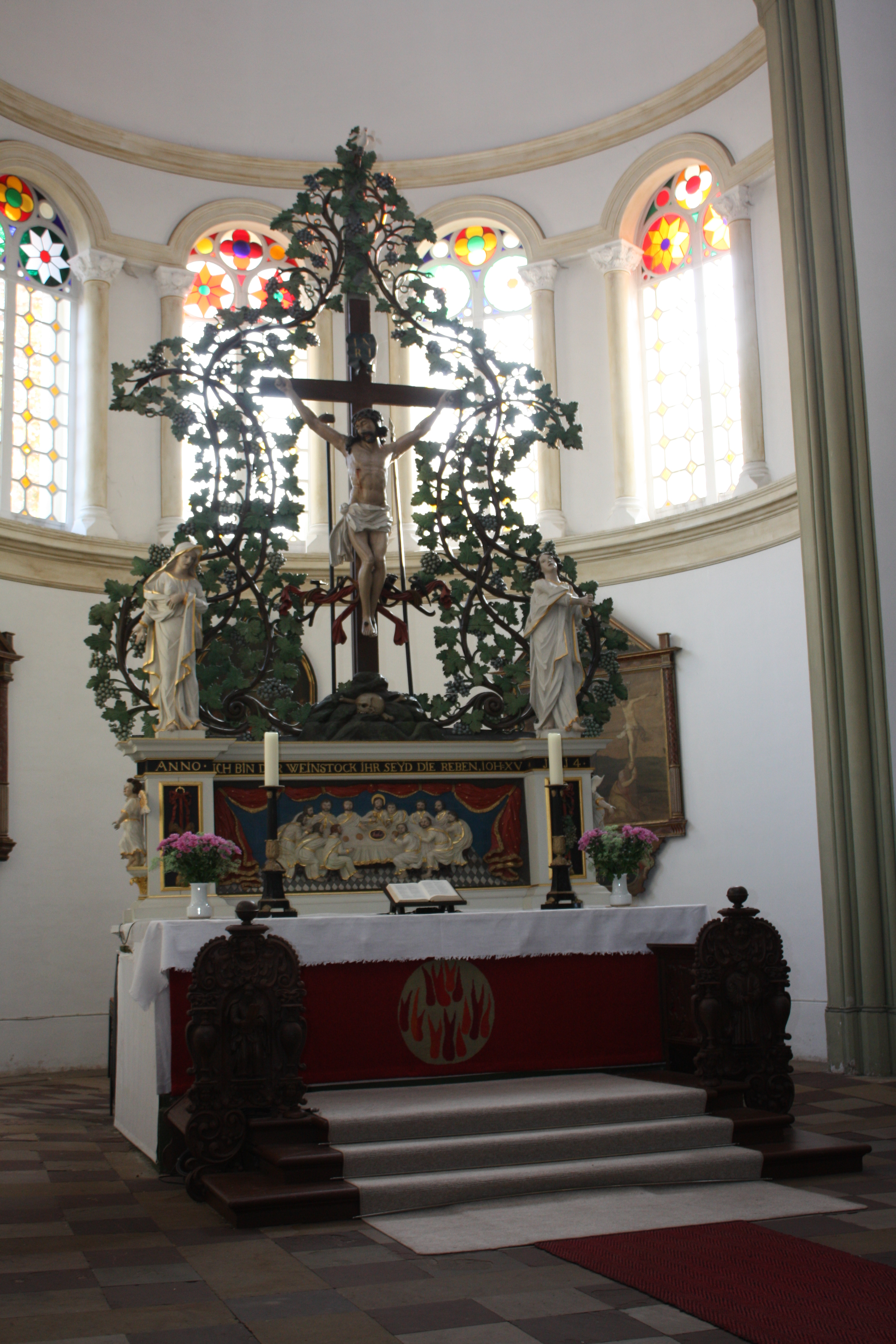 Hochaltar von St. Magnus in Esens